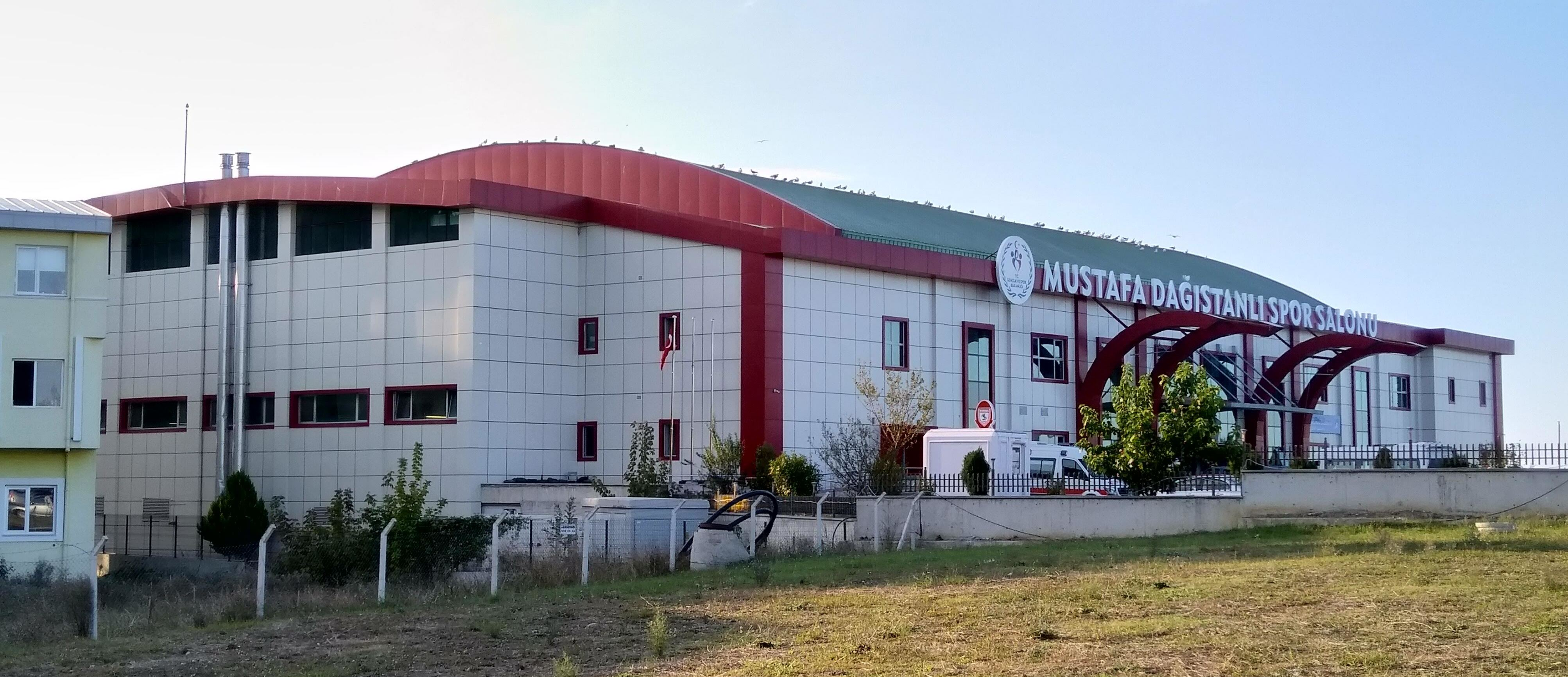 Samsun'un İlkadım ilçesinde bulunan Mustafa Dağıstanlı Spor Salonu'nun kuzeydoğu cephesinden görünümü.